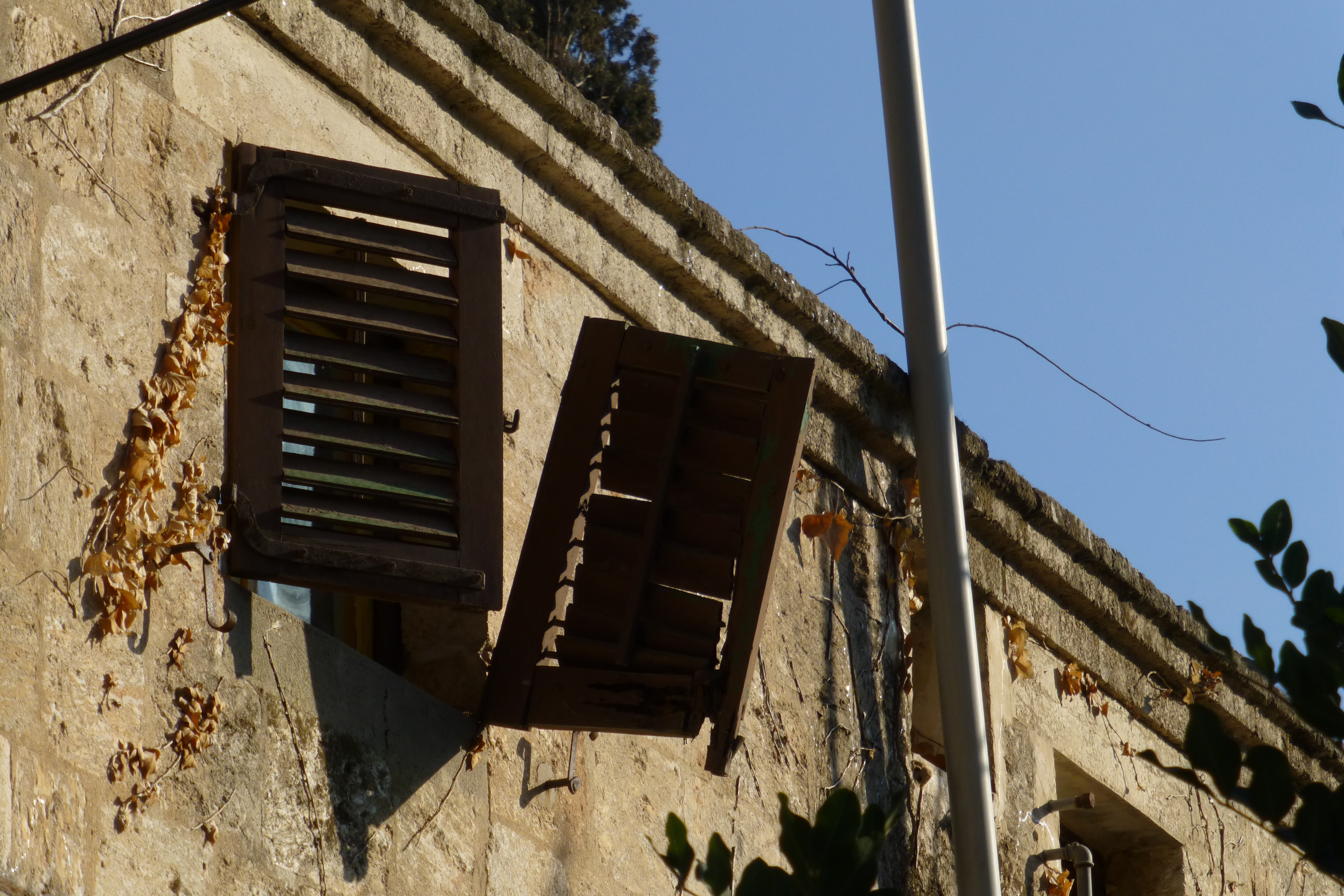 ראשוני המתיישבים באתר היישוב אלוני אבא היו בני הדור השני של תנועת הטמפלרים הגרמנים, אשר הקימו במקום בשנת 1907 מושבה חקלאית קטנה ושמה "ולדהיים".